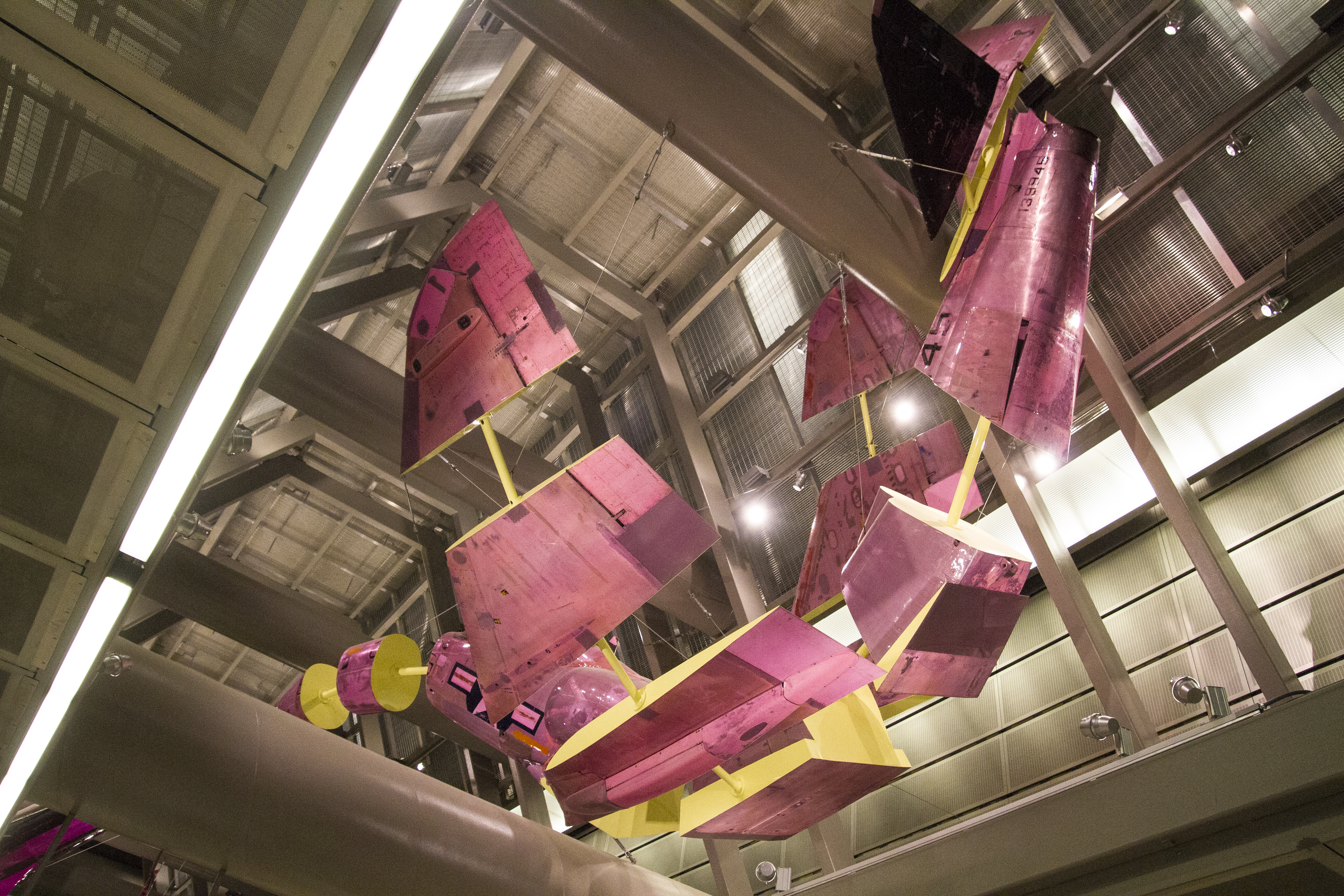 Capitol Hill Station Media Tour 05-26-15 10